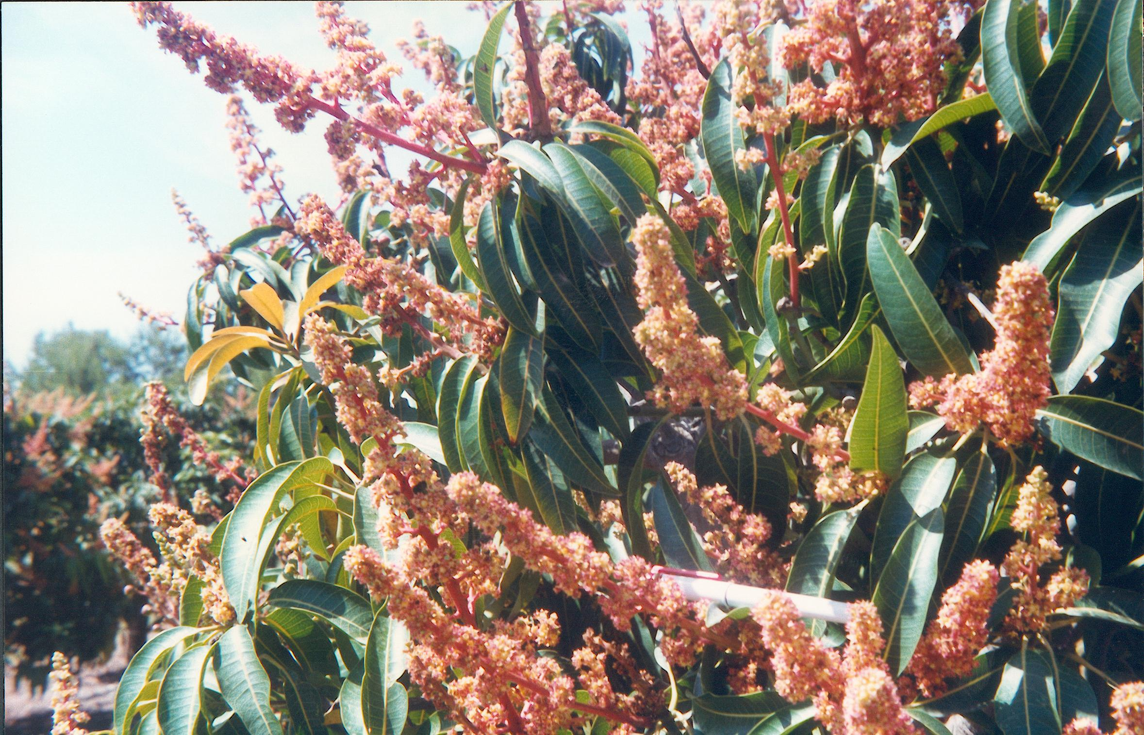 Arbre de l'Alvocat- Persea americana (Avocado) - amb inflorescències